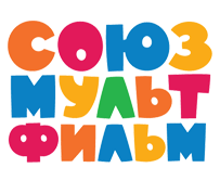 Логотип киностудии "Союзмультфильм"